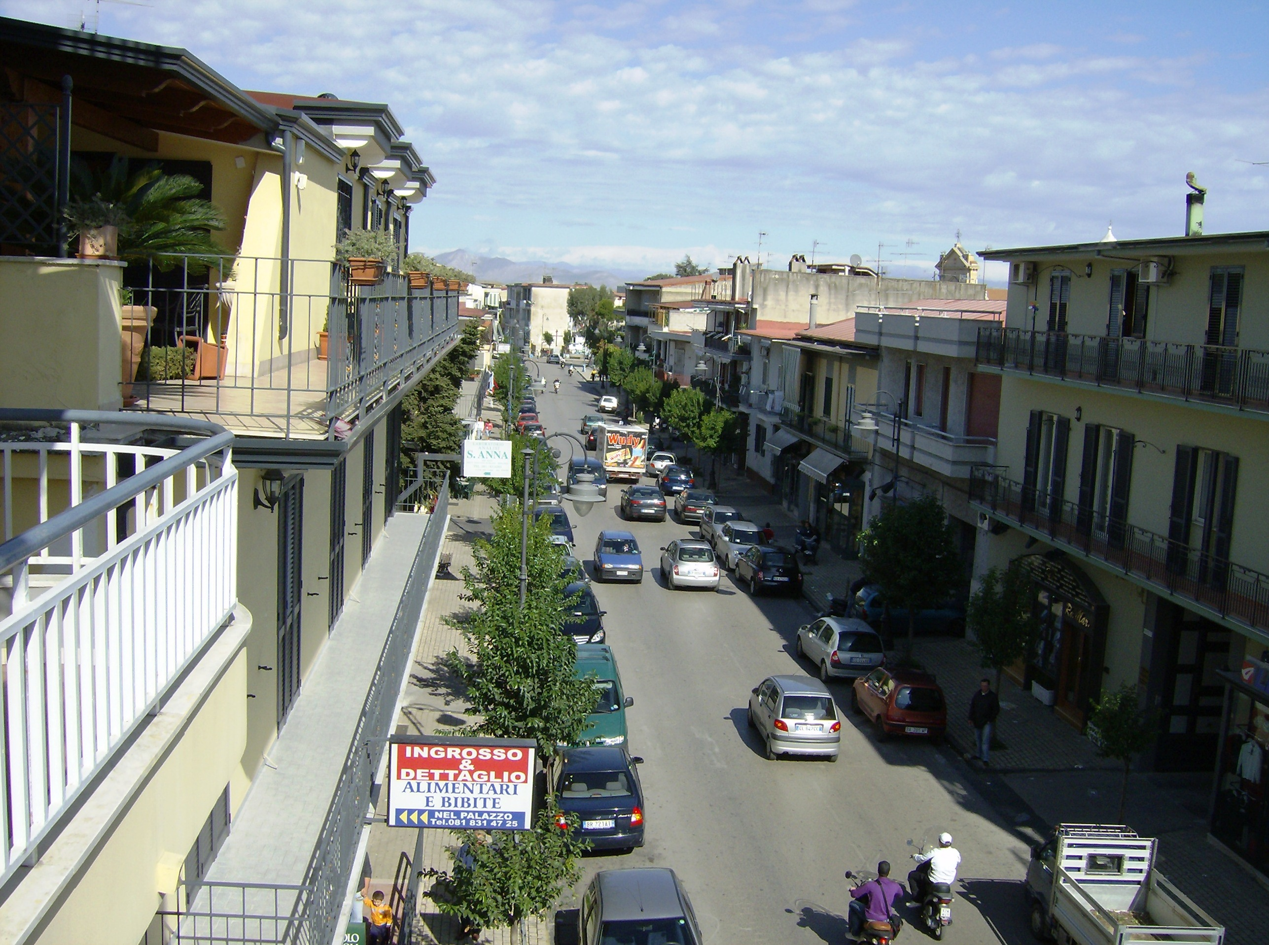 Fratta Minore